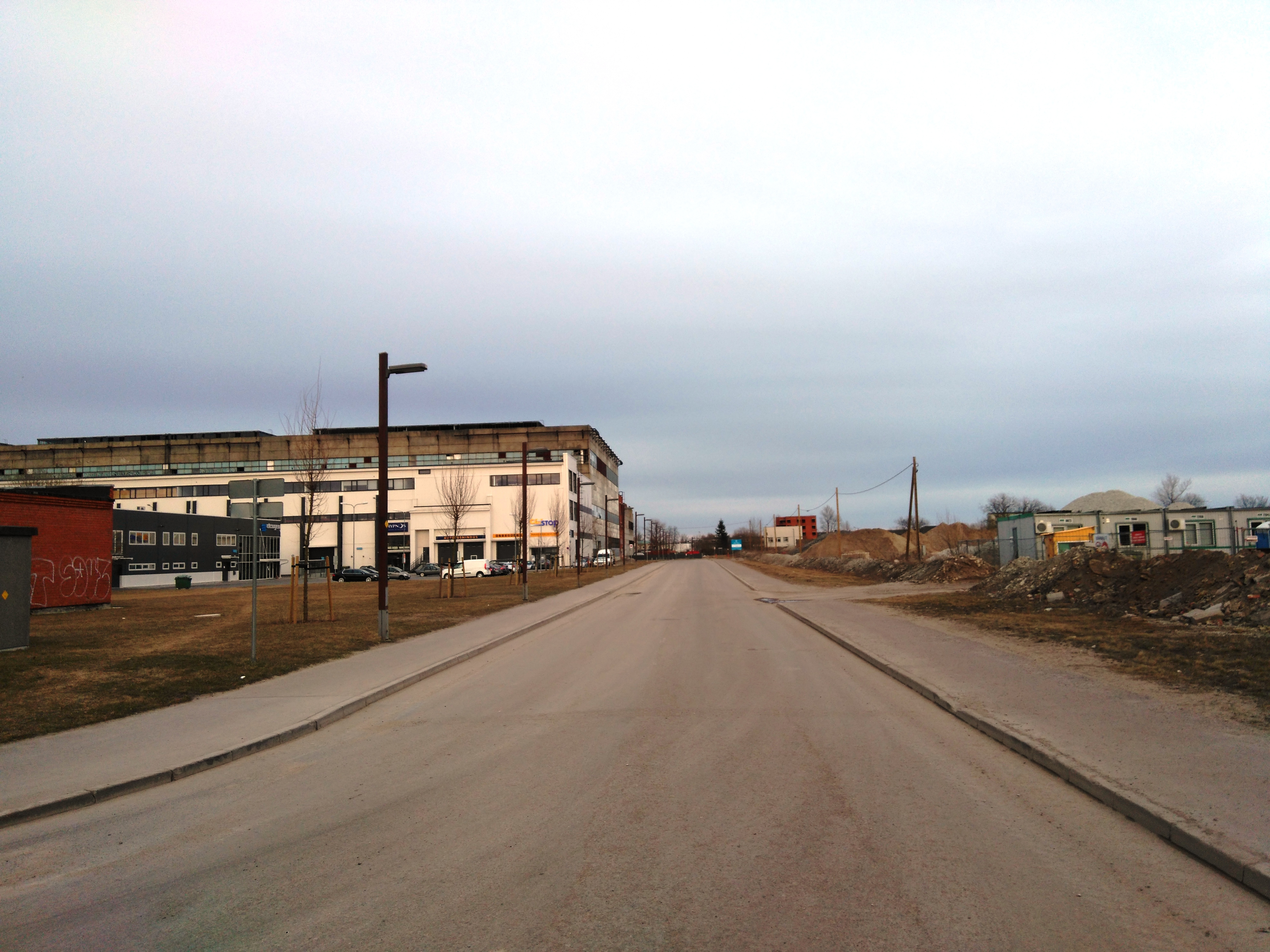 Valukoja tänav Tallinnas.